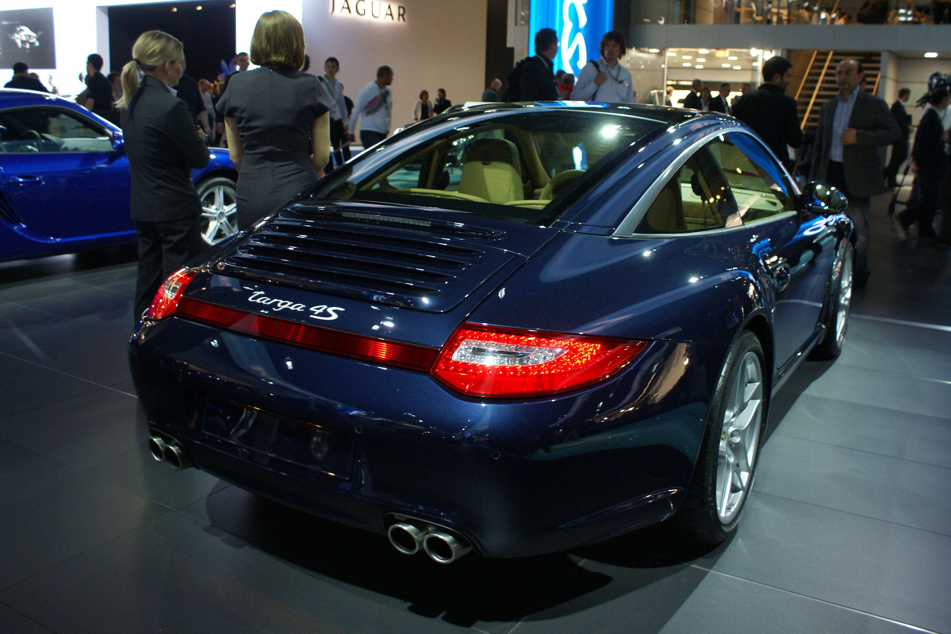 Porsche 997 Targa Facelift